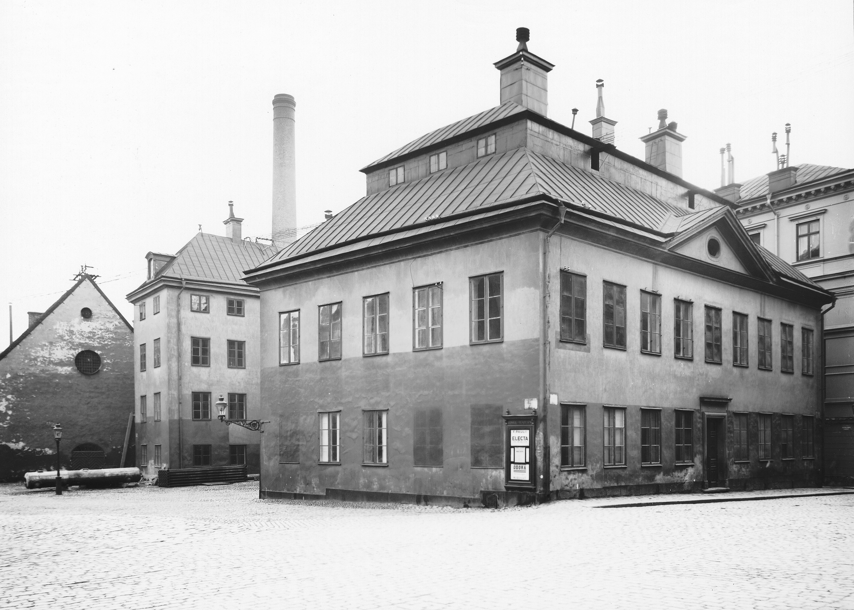 Indebetouska huset strax före rivning, fasad mot Slottsbacken och Källargränd